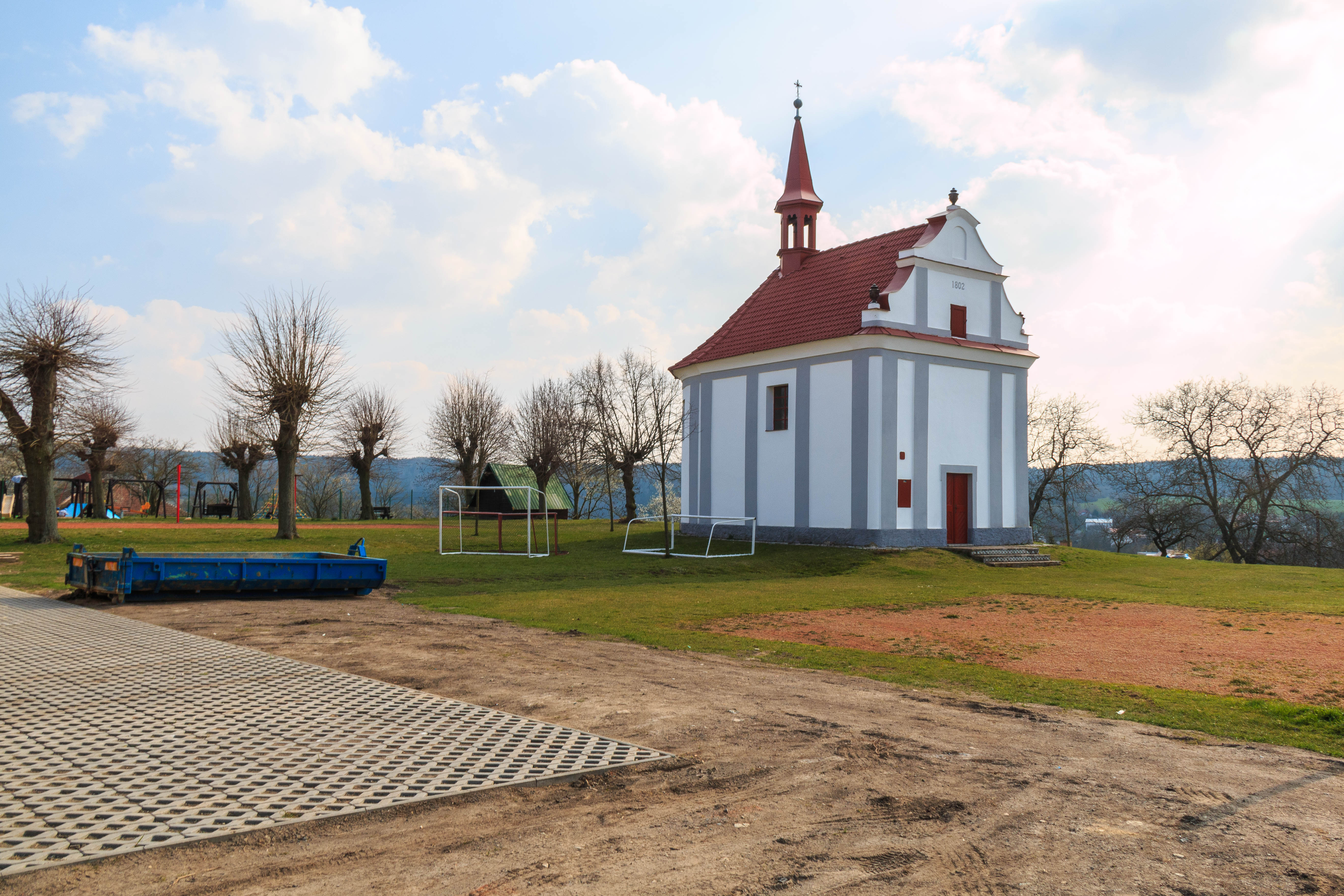 Horka kaple